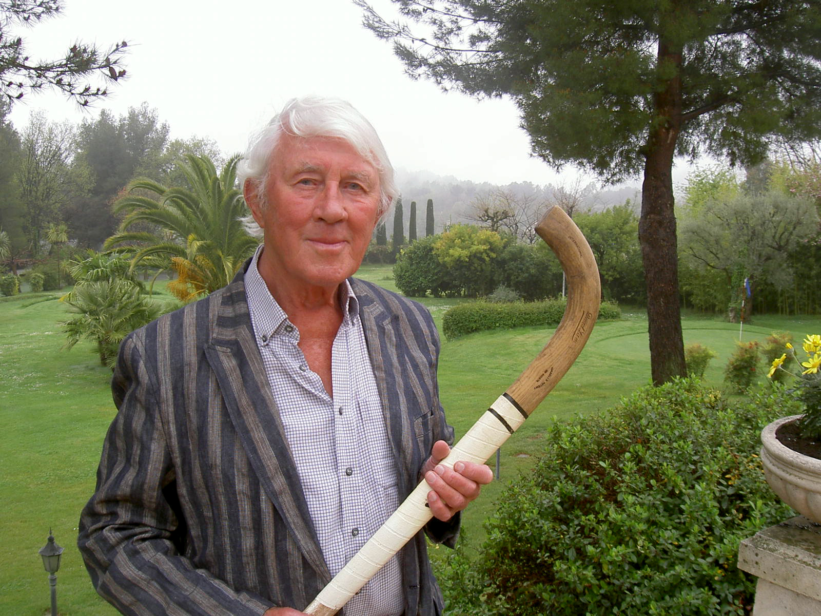 Nederlands hockeyspeler